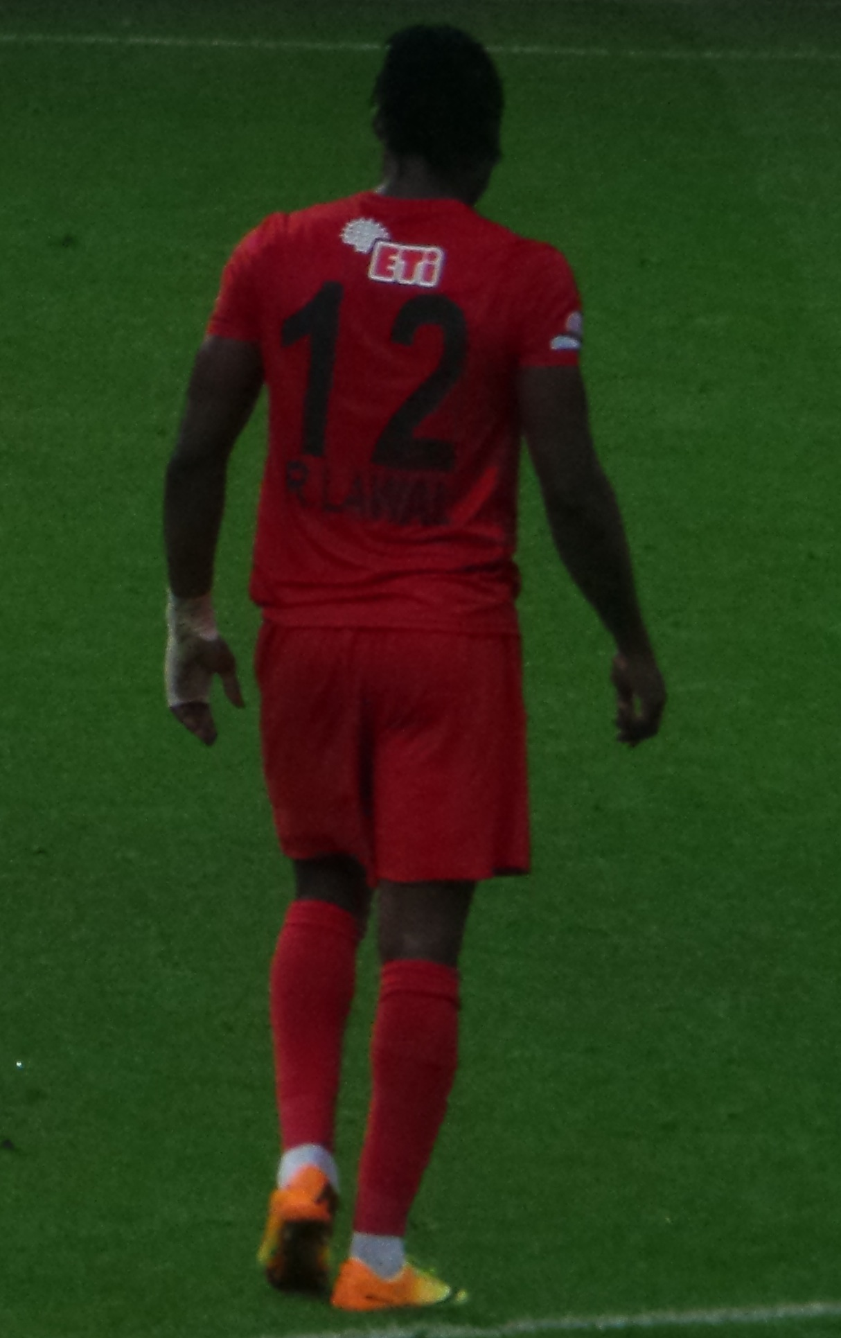 Lawal with his nr. 12 kit